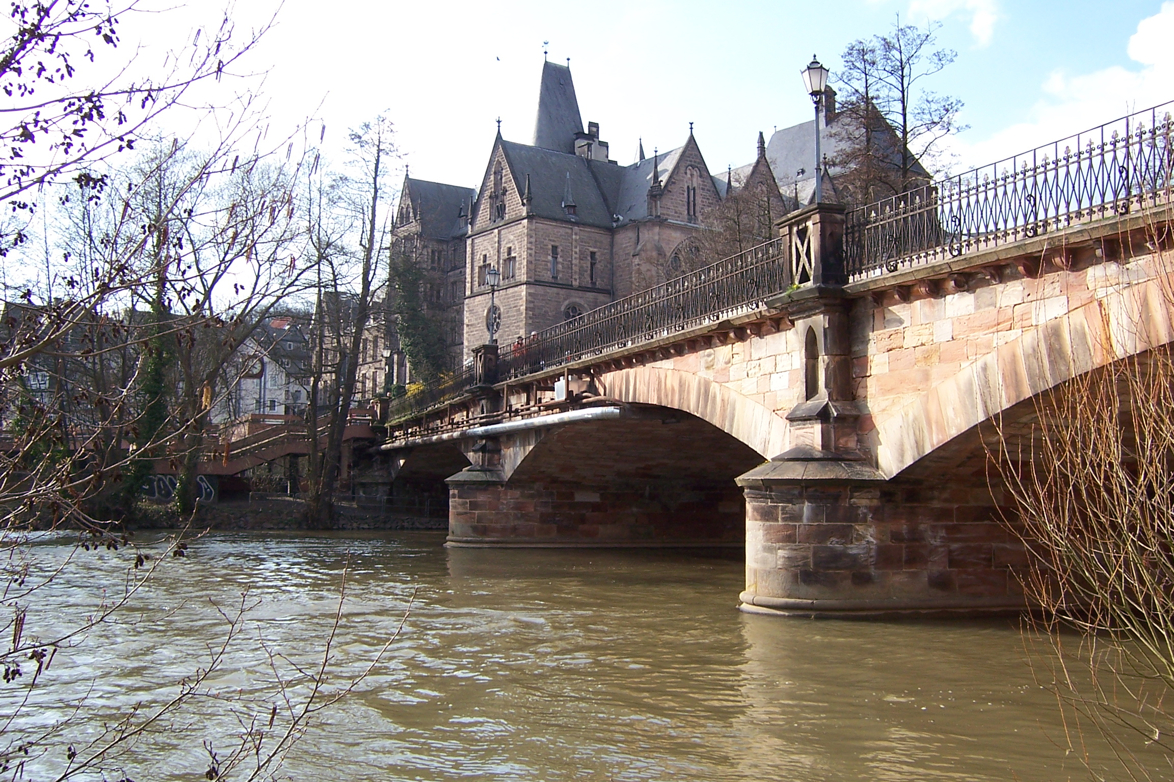 Weidenhäuser Brücke und Alte Universität im Hintergrund. Ansicht von Südosten.